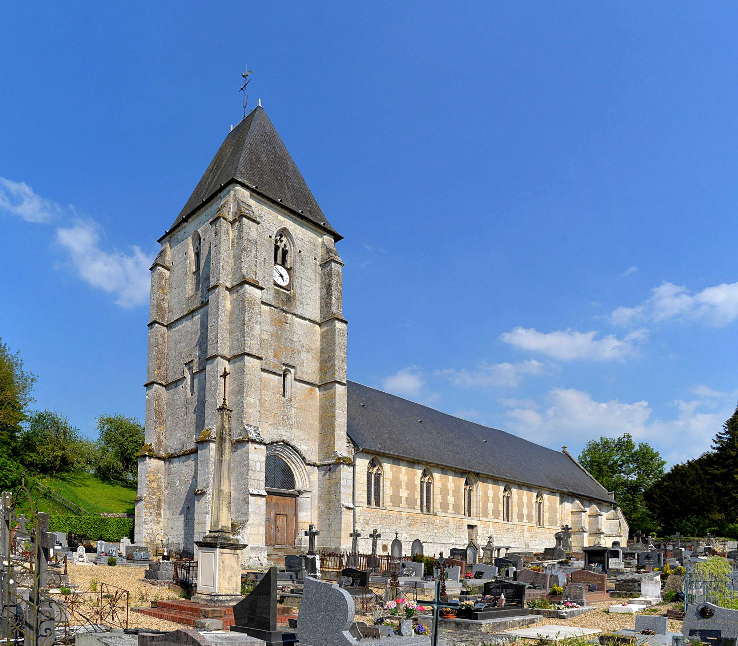 Blangy-le-Château (Calvados)